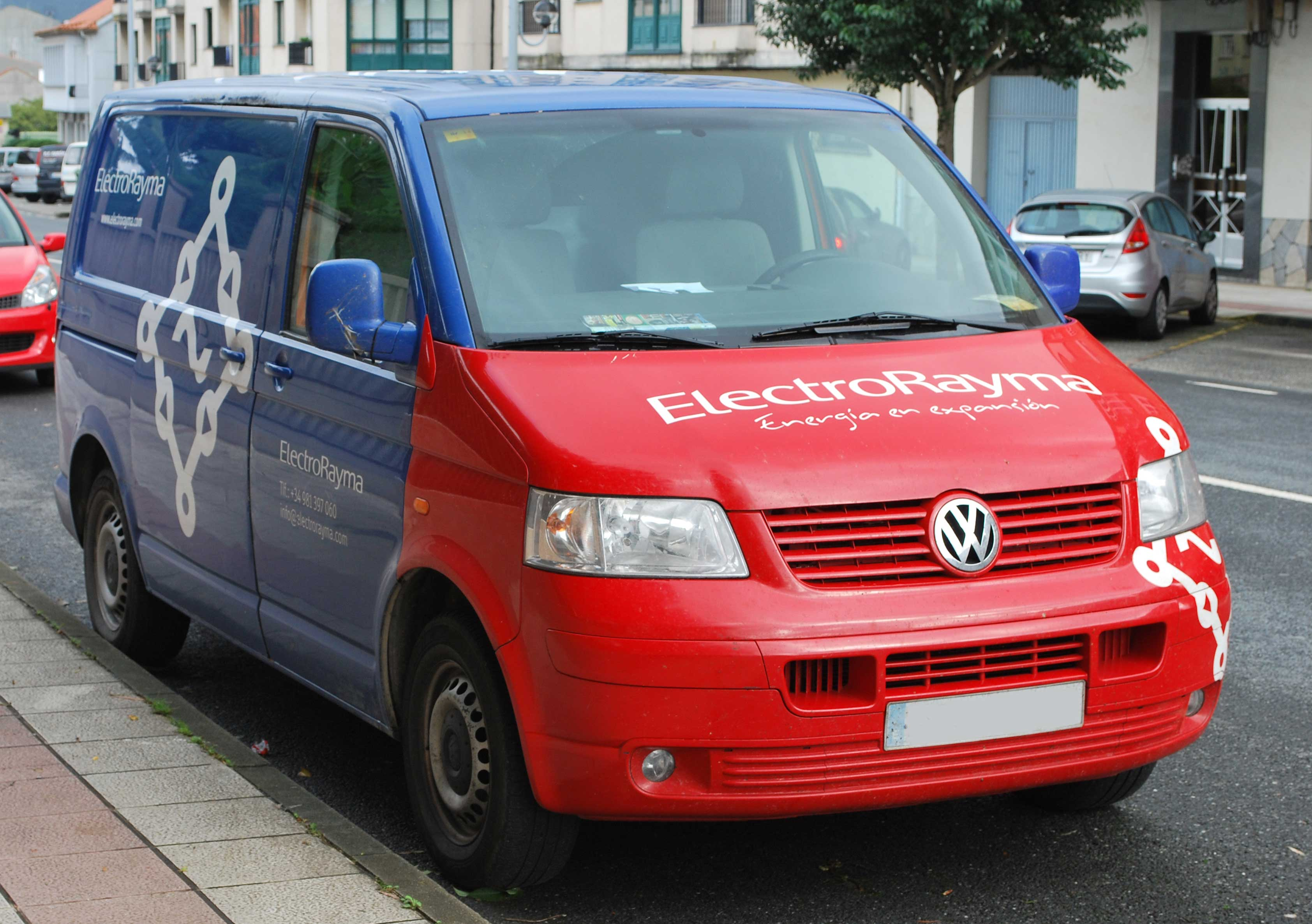 Furgo de Electrorayma en Piñeiros Narón